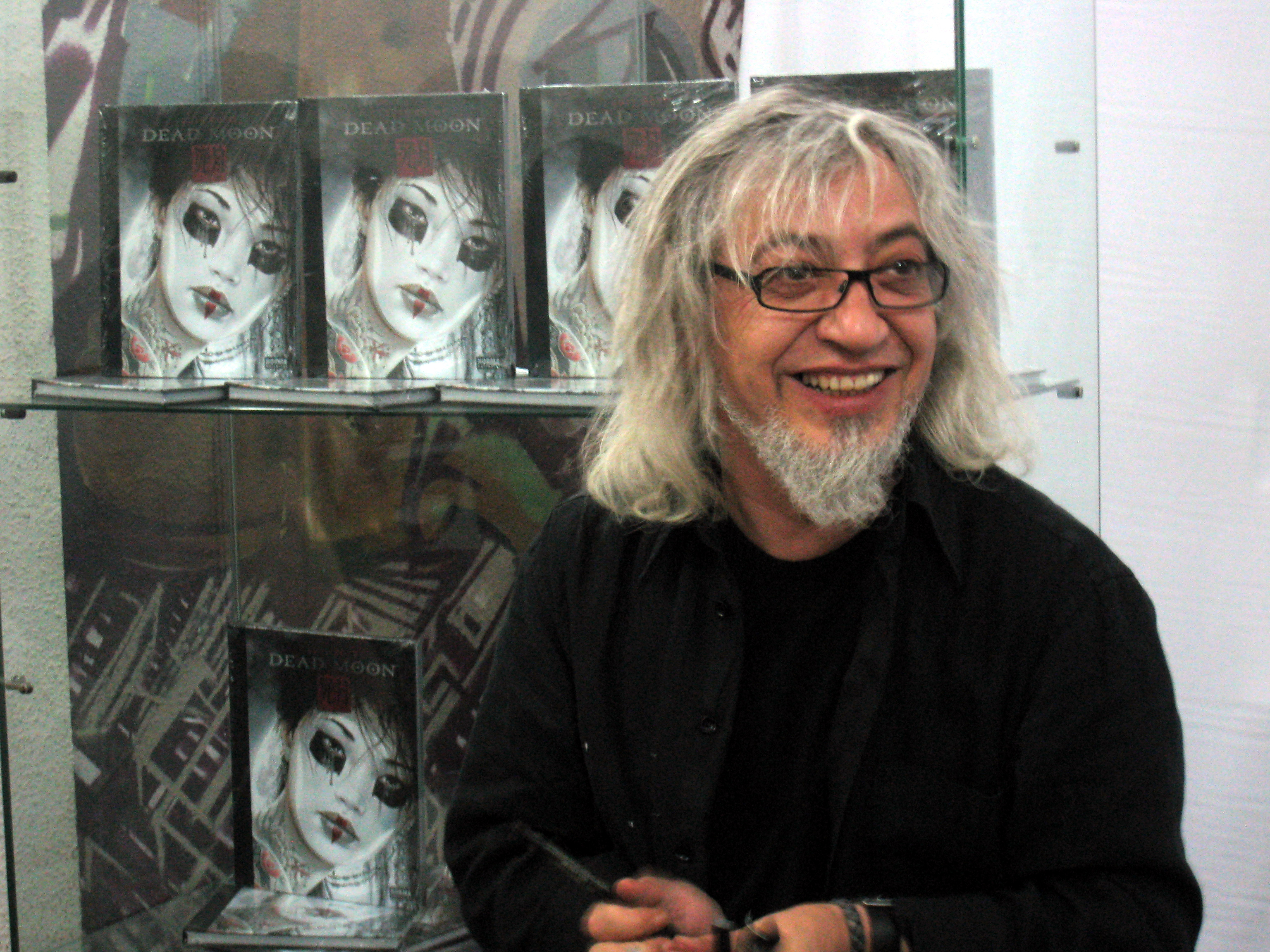 Luis Royo en la presentación y firma de su obra "Dead Moon" en la tienda "Generación X" en Madrid el 24 de abril de 2009.